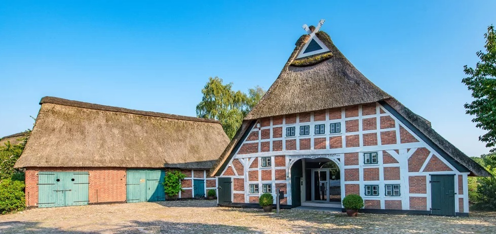 Altes Hallenhaus in Dollern